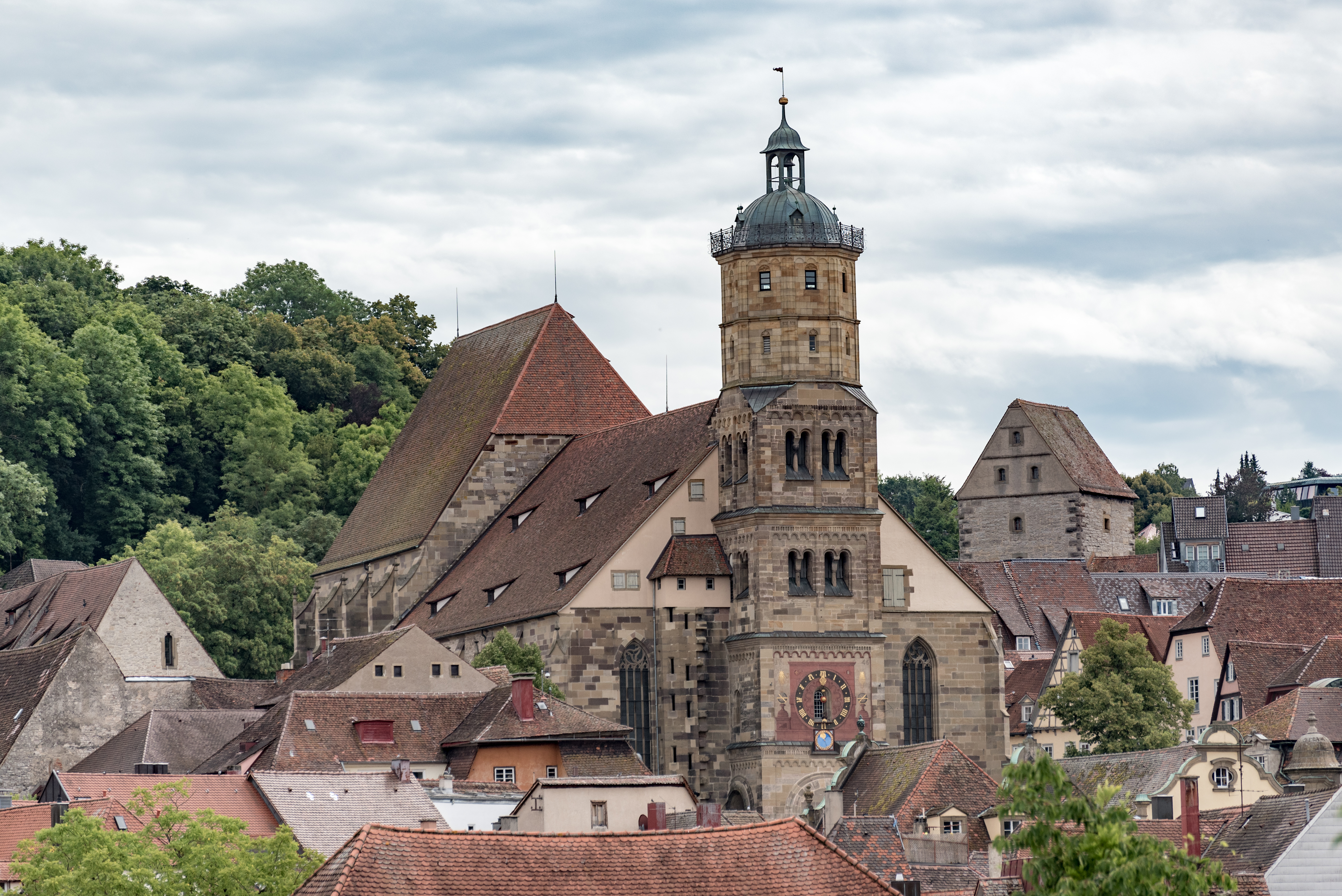 Schwäbisch Hall, Kirche St. Michael, Ansicht vom Weiler Tor